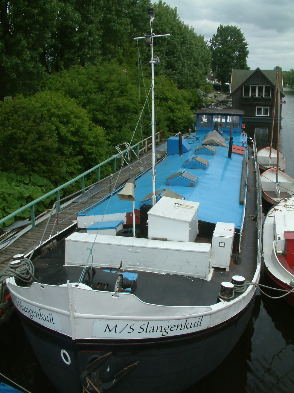 De M/S SLANGENKUIL voor de wal in het Noorderkanaal in Rotterdam.